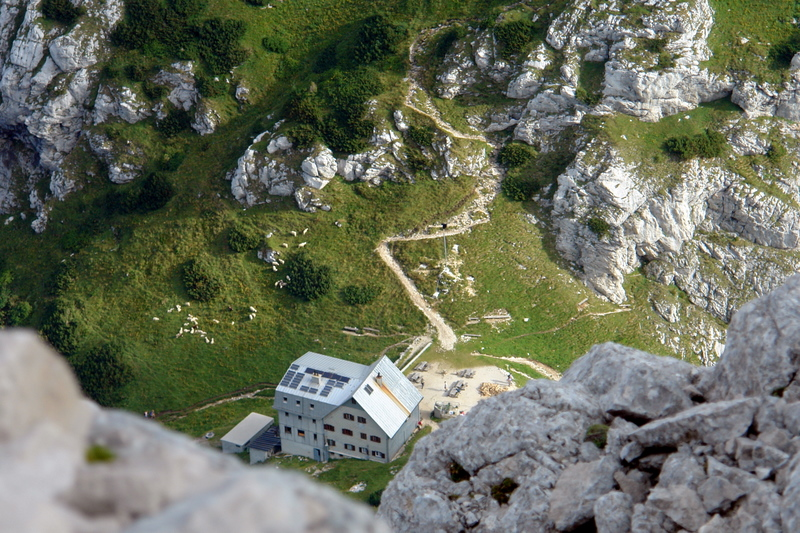 Zoisova koča na Kokrškem sedlu s Kalške gore